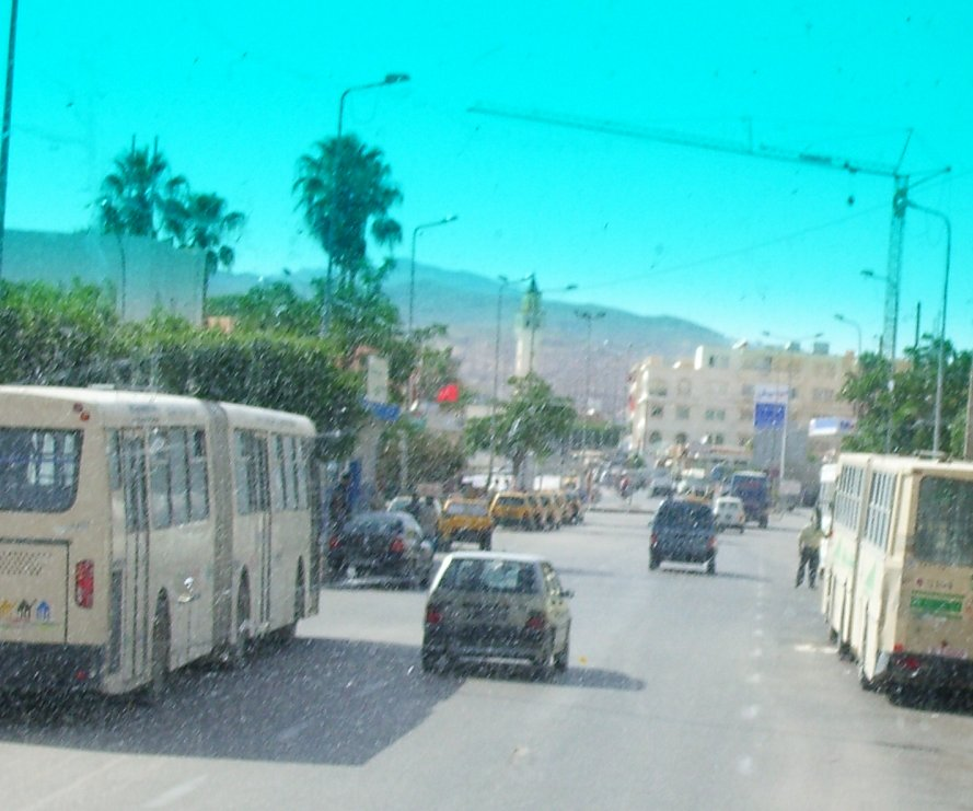 Gafsa zona centrica